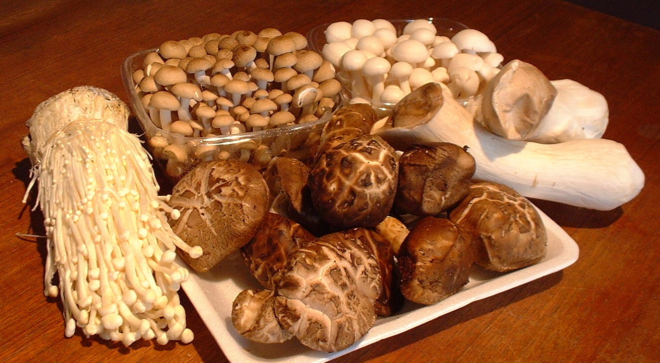 Enoki, Buna-shimeji, Bunapi-shimeji, king oyster mushroom and shiitake.